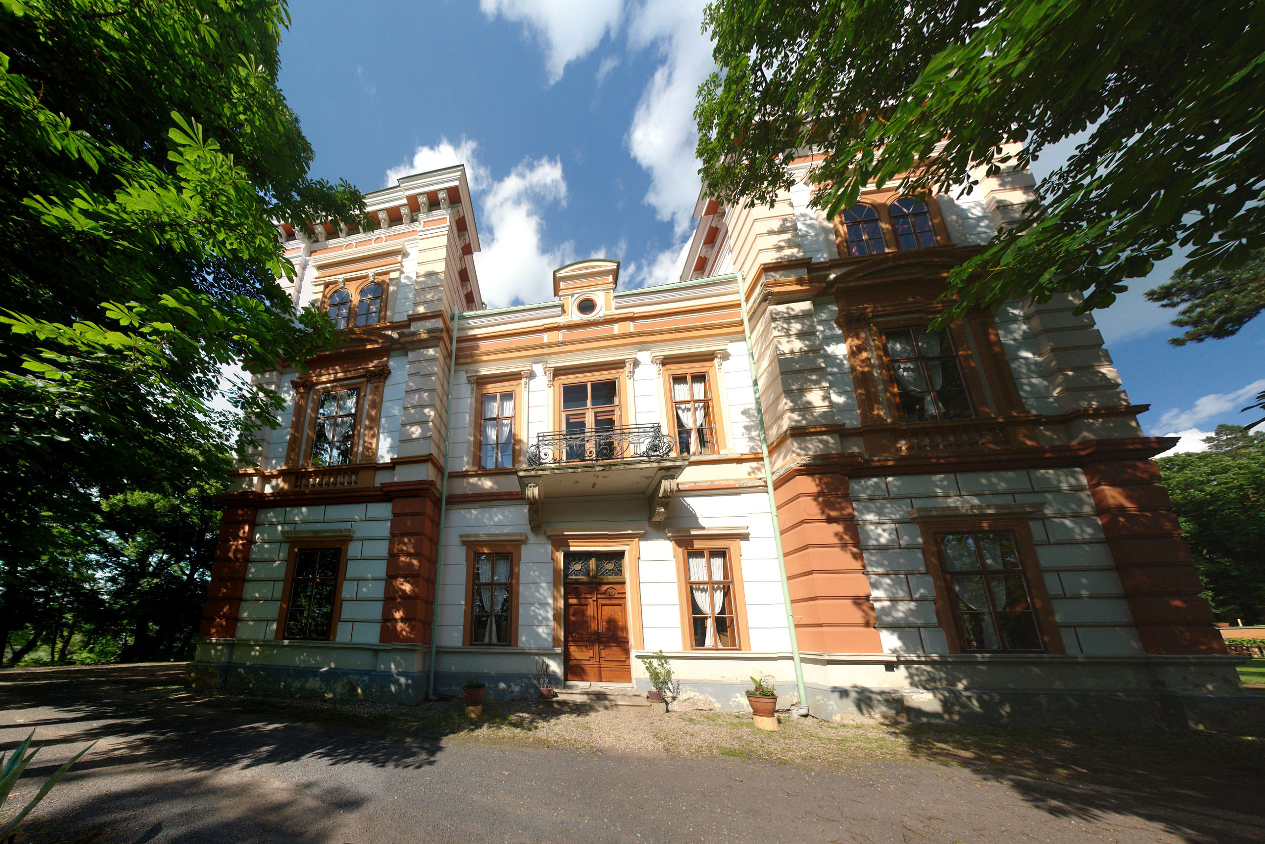 Zámek Korozluky